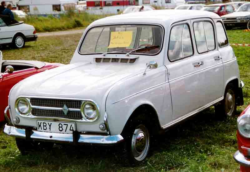 Renault 4 R 1123 1968